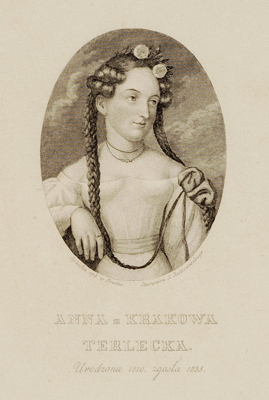 Anna Terlecka